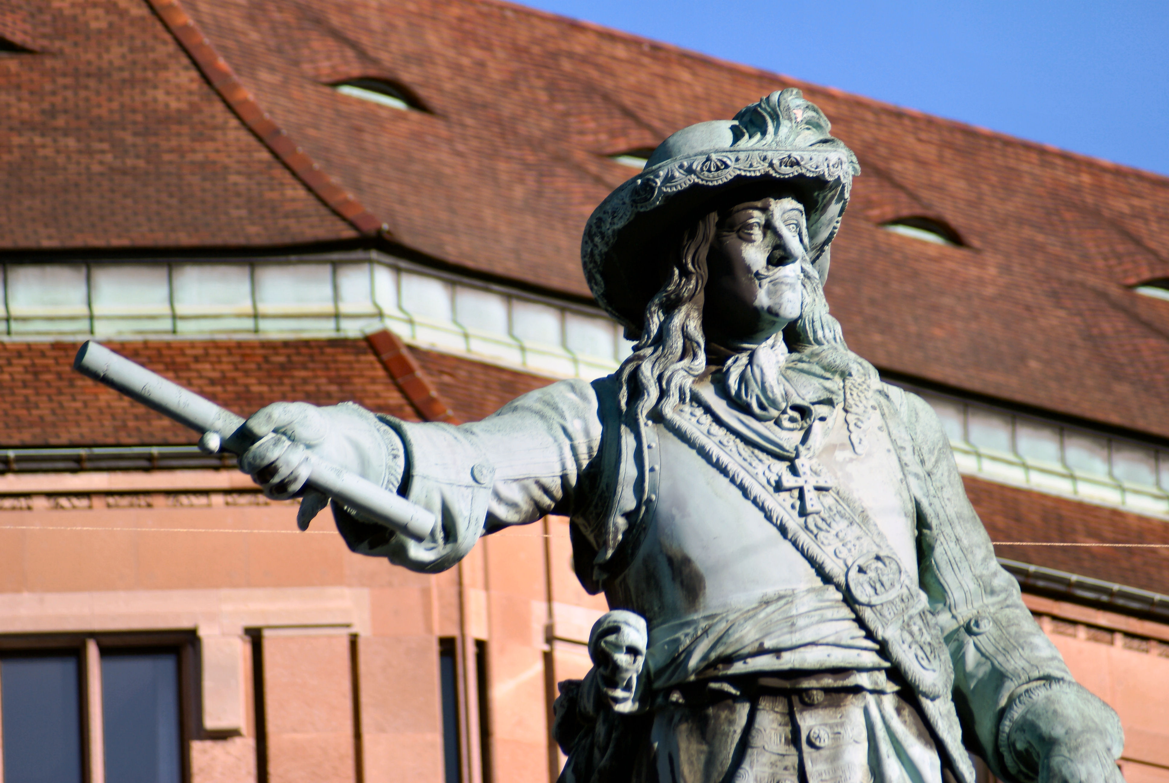 Søhelten Niels Juel, statue i København